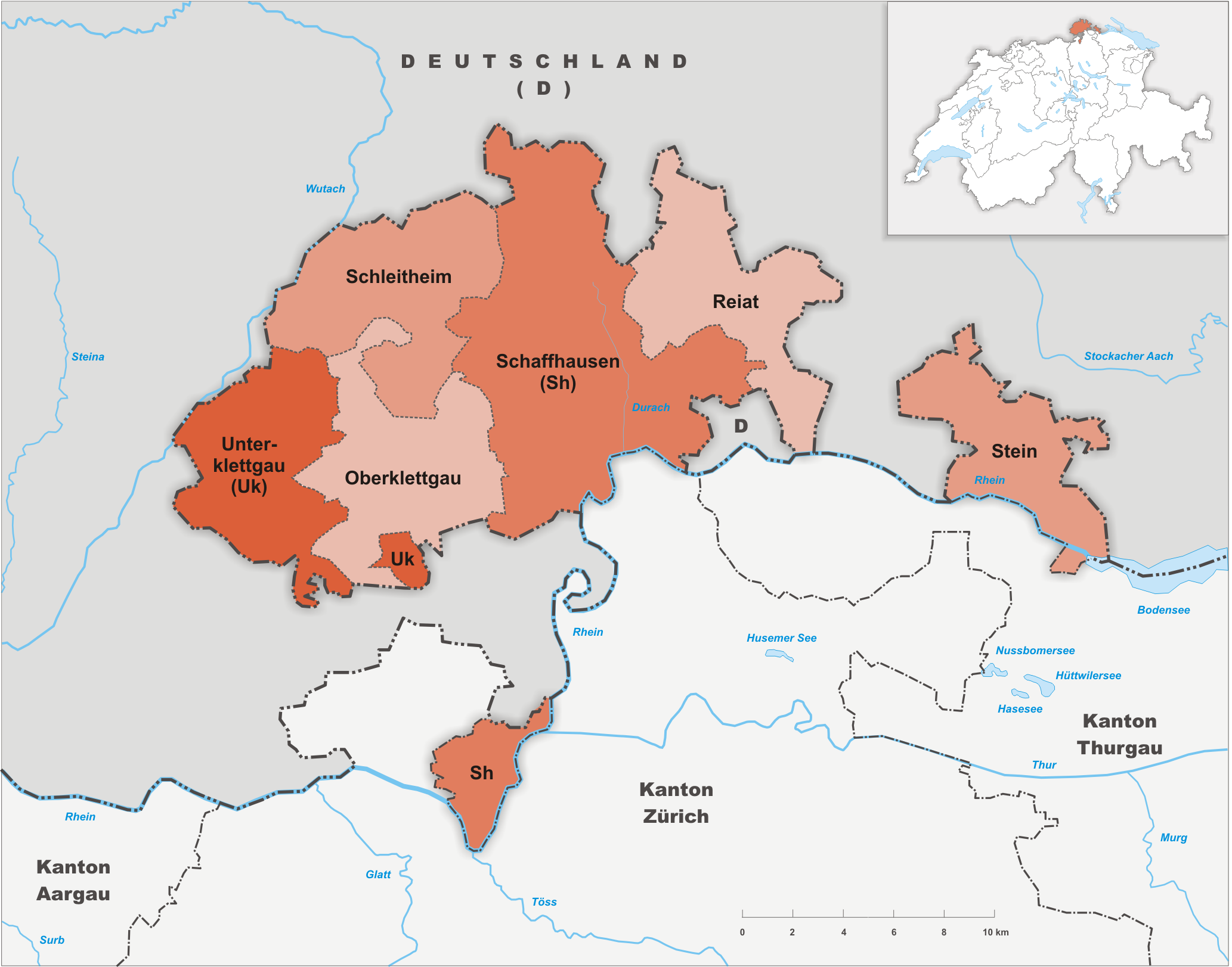 Bezirke des Kanton Schaffhausen bis 2004